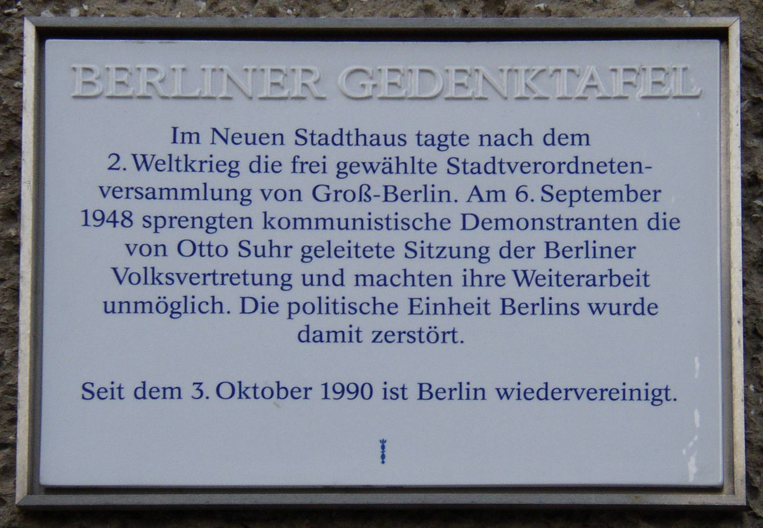 Berliner Gedenktafel (Parochialstr. 1-3) für das Neue Stadthaus und Otto Suhr in Berlin-Mitte, Deutschland